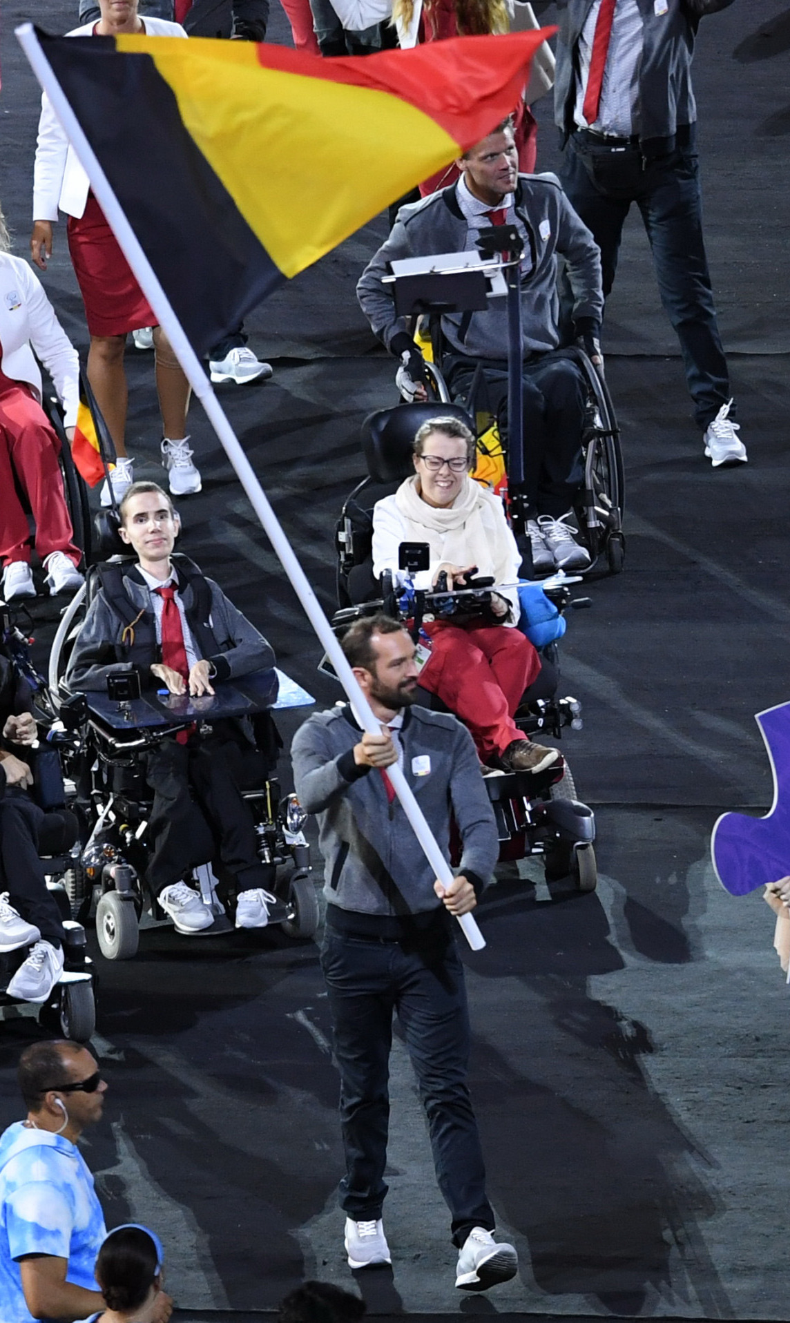 Rio de Janeiro - Cerimônia de abertura dos Jogos Paralímpicos Rio 2016 no Estádio do Maracanã